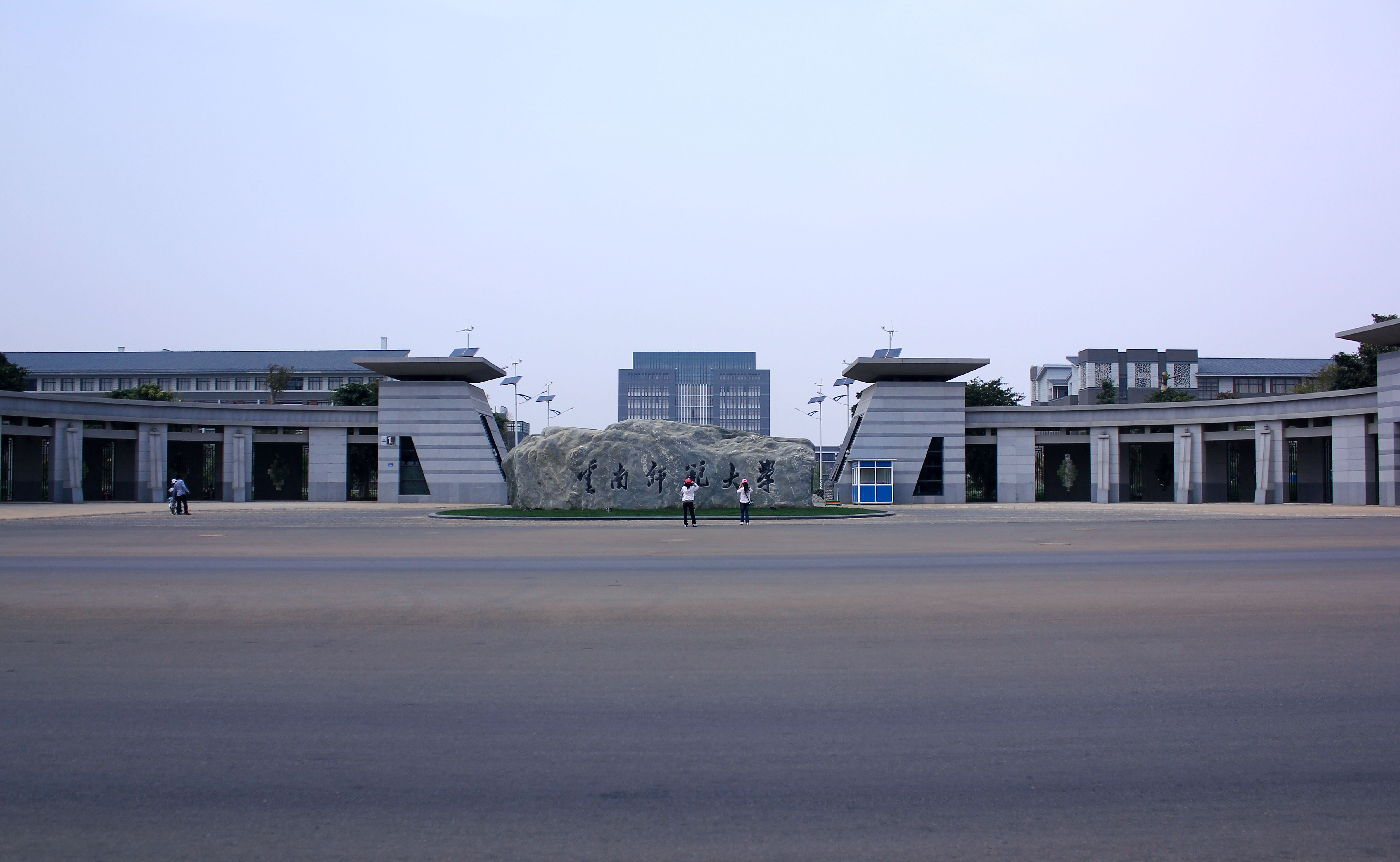 云南师范大学呈贡校区正门